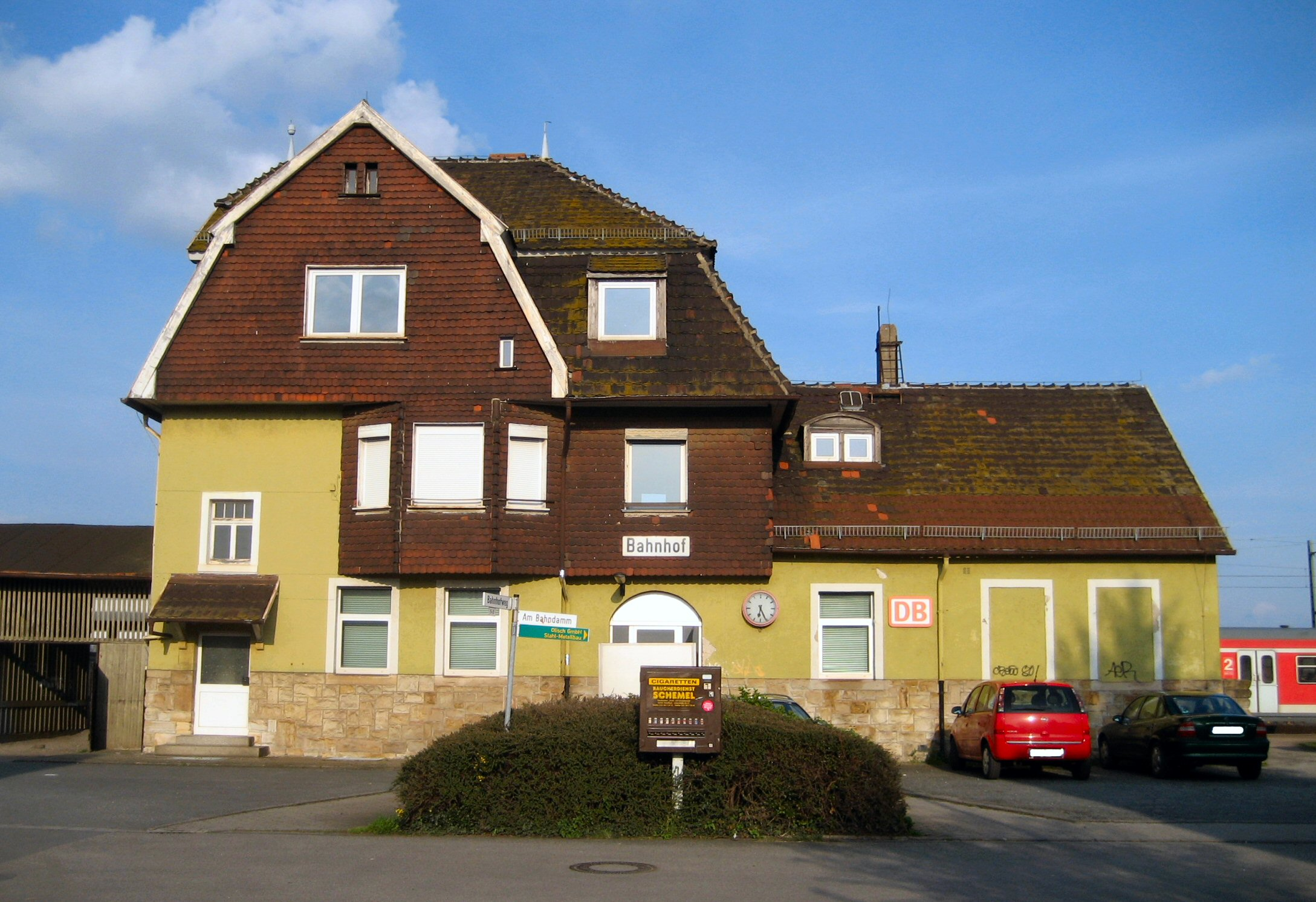 Denkmalgeschützter Bahnhof im hessischen Dornheim